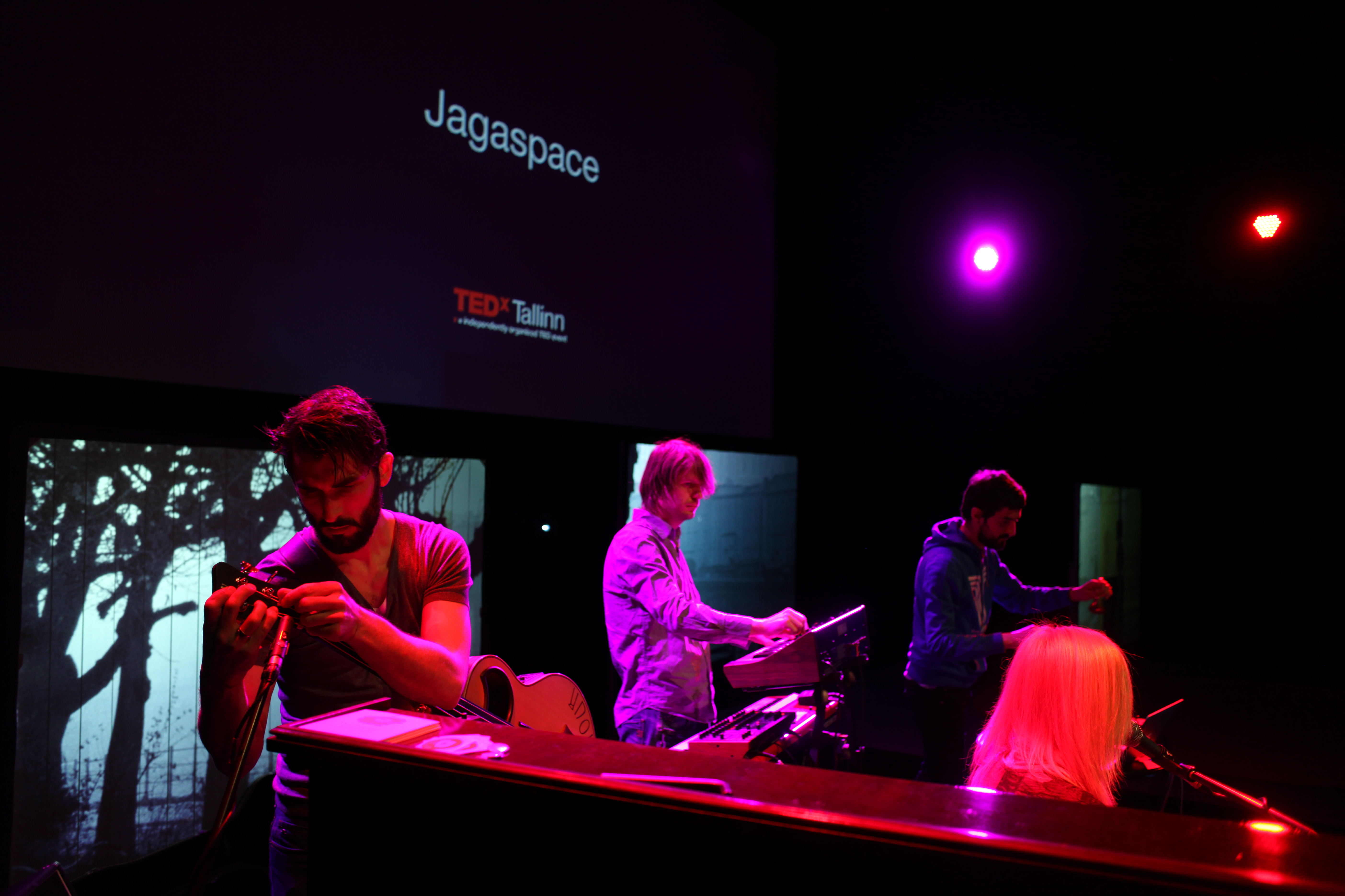 Jagaspace esinemas TEDxTallinn konverentsil 2012. aastal.